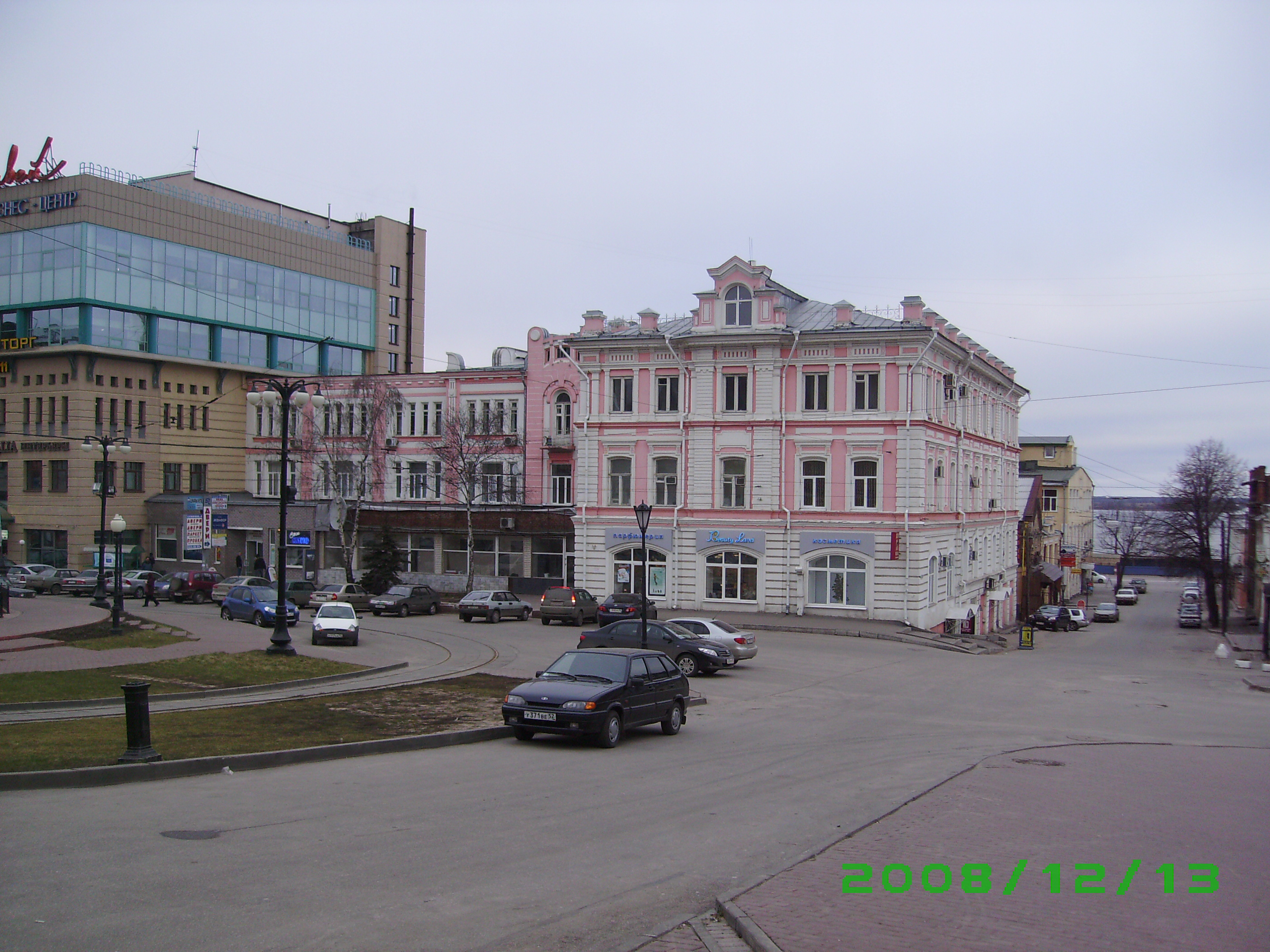 Рождественская 11